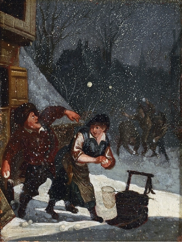 Dezember (?). Aus einer Reihe von 12 Monatsbildern nach Jan Miense Molenaer, deutsch, spätes 17. Jahrhundert. Öl auf Holz. 32,6 x 24,5 cm.